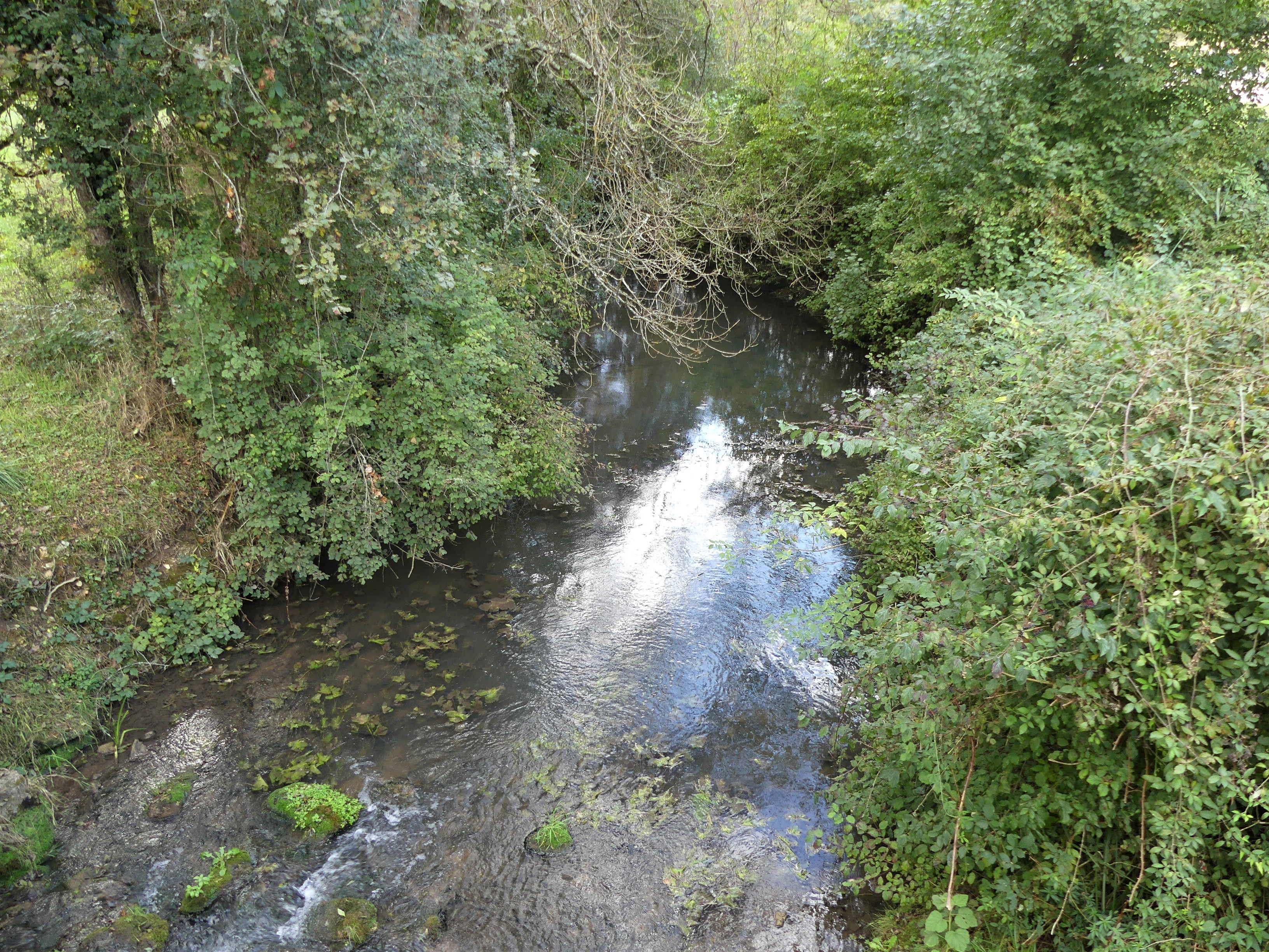 La Nizonne au pont du Râteau, en limite des communes déléguées de Puyrenier (à gauche) et de Beaussac (à droite), commune nouvelle de Mareuil en Périgord, Dordogne, France. Vue prise en direction de l'aval.